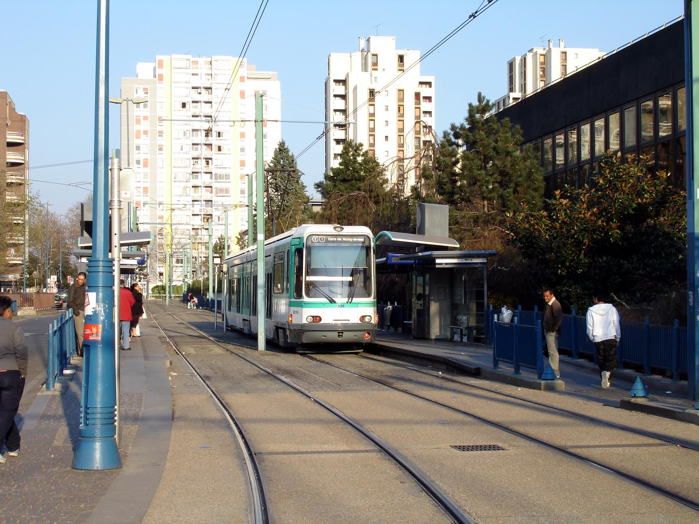 Station de la ligne 1 du tramway parisien Pablo-Picasso à Bobigny (Seine-Saint-Denis), France